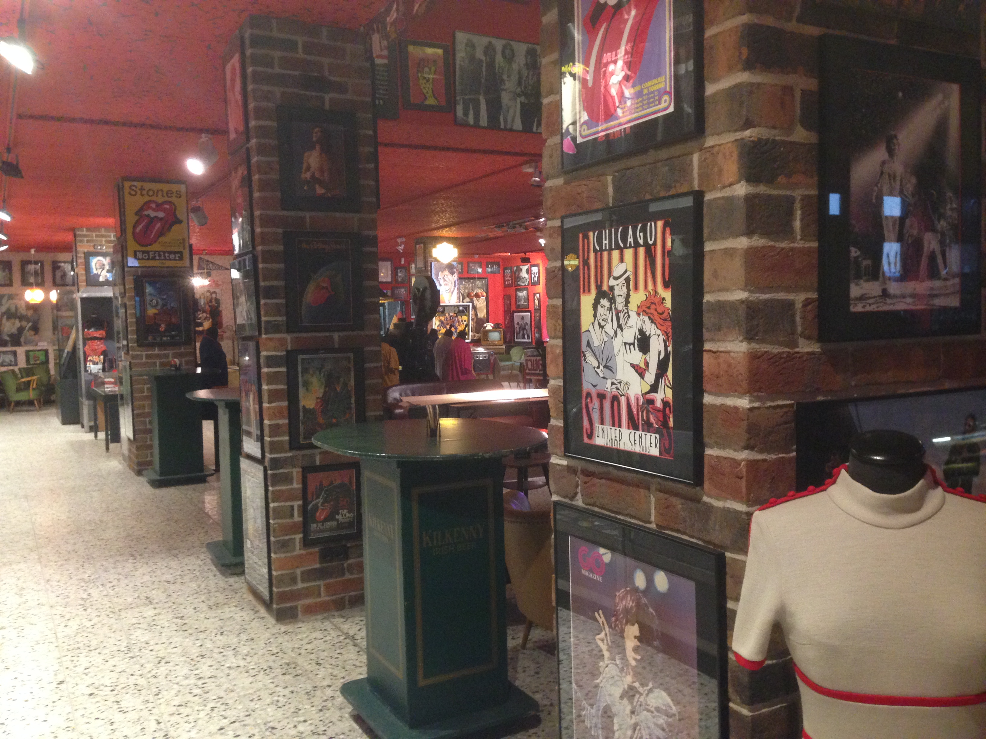 Stones Fan Museum, Lüchow, Germany